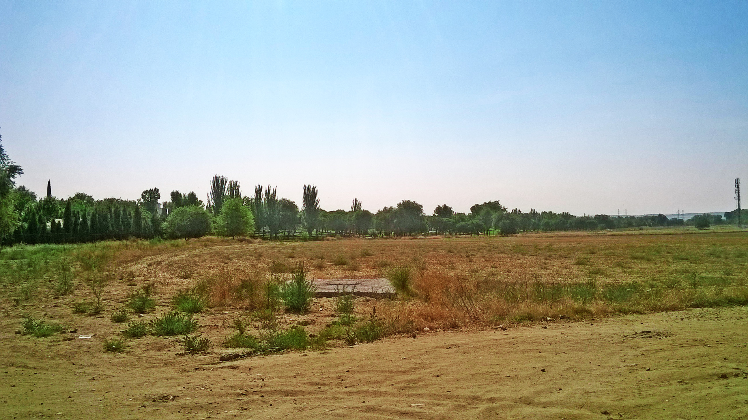 Vista de paisaje natural hacia el parque de las comunidades de España (Parla)